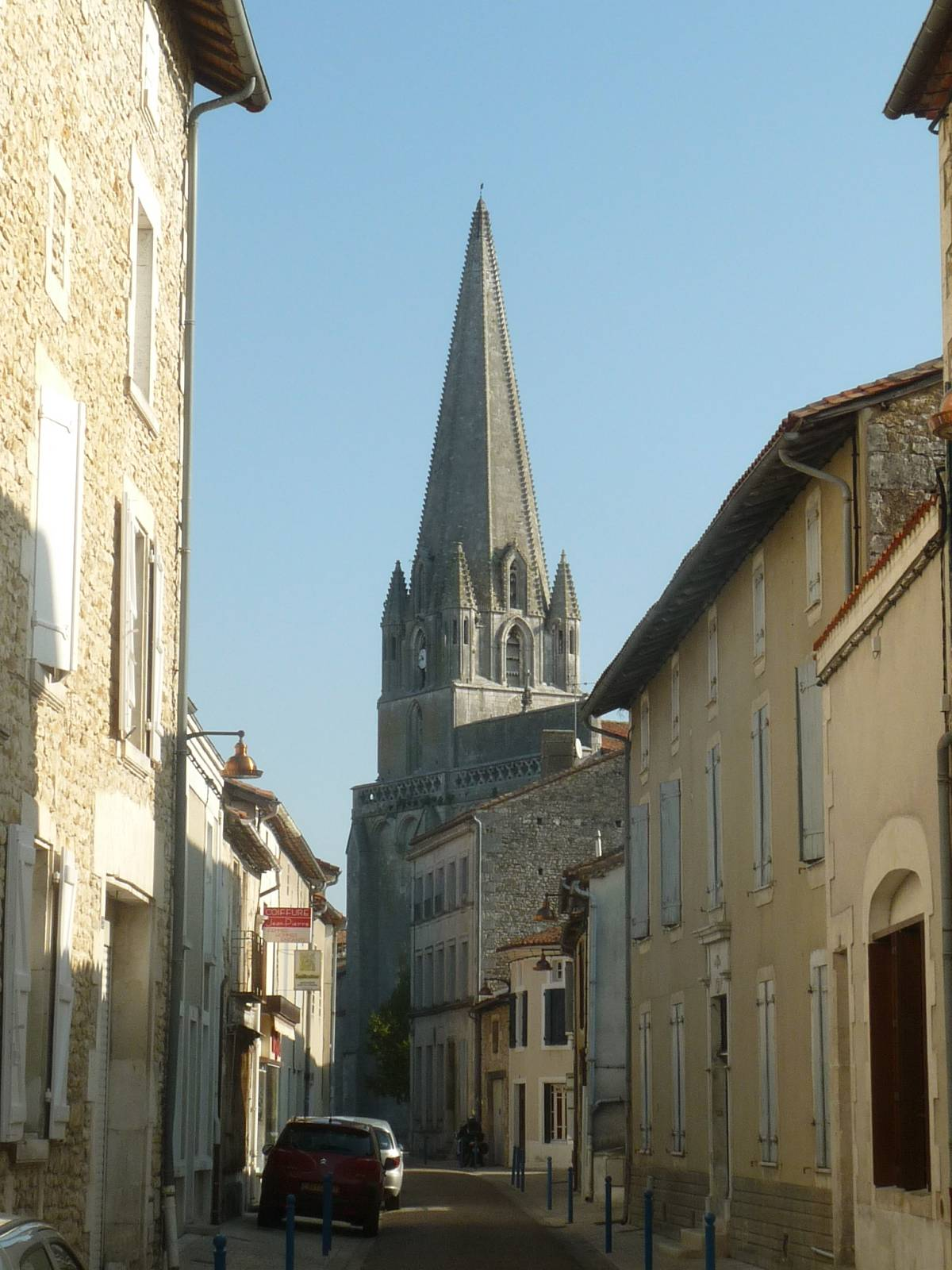 collégiale de la Rochefoucauld (16), France